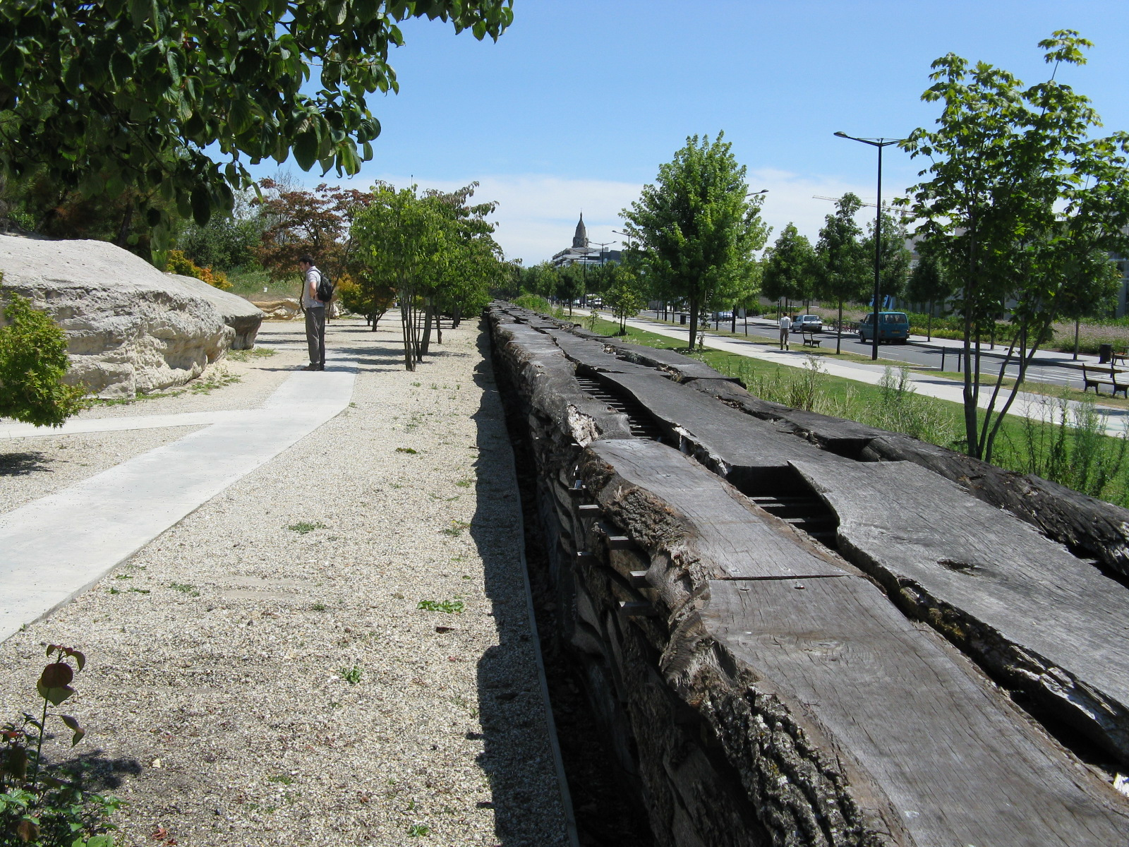 Bordeaux: Jardin Botanique 18